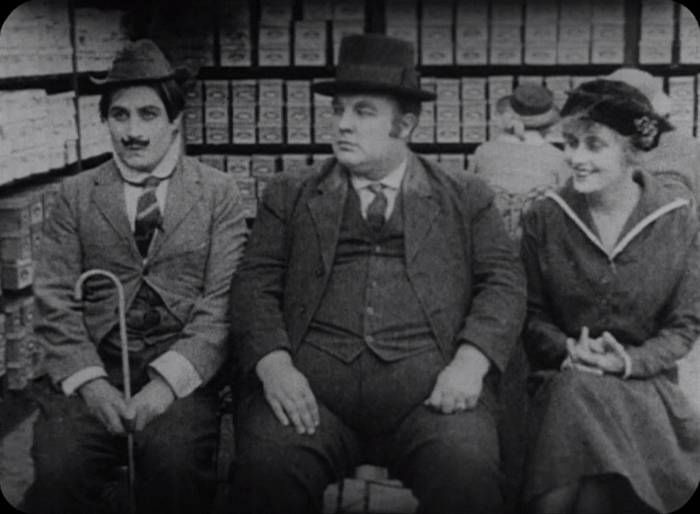 Syd Chaplin, Frank Alexander & Joy Lewis dans A Lover's Lost Control (1915)